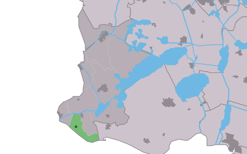 Kaartsje fan himrik fan Skarl